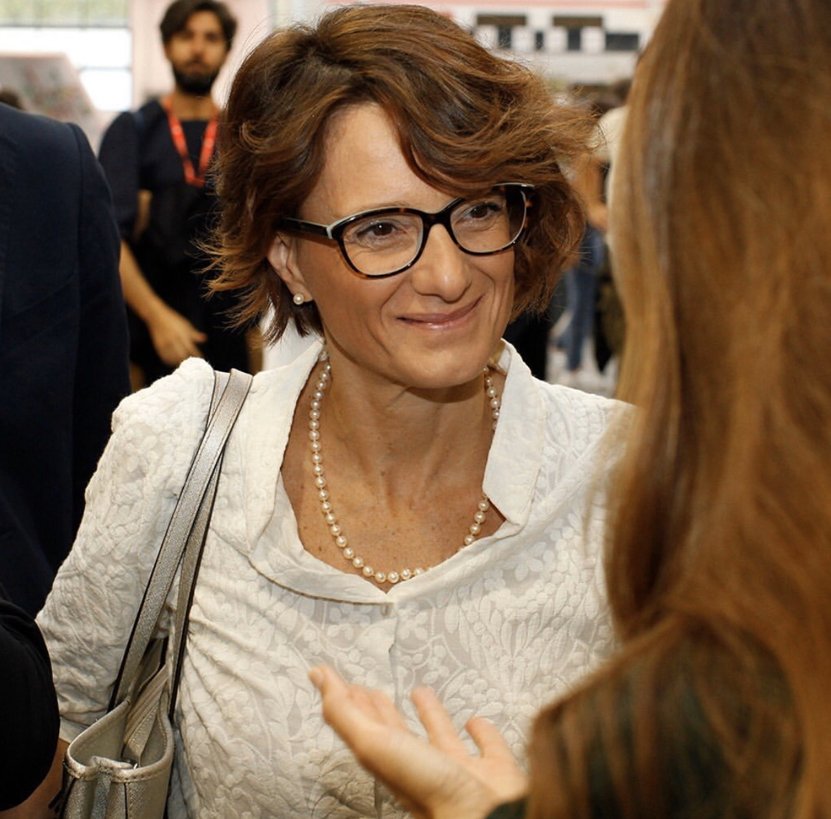 Elena bonetti a milano